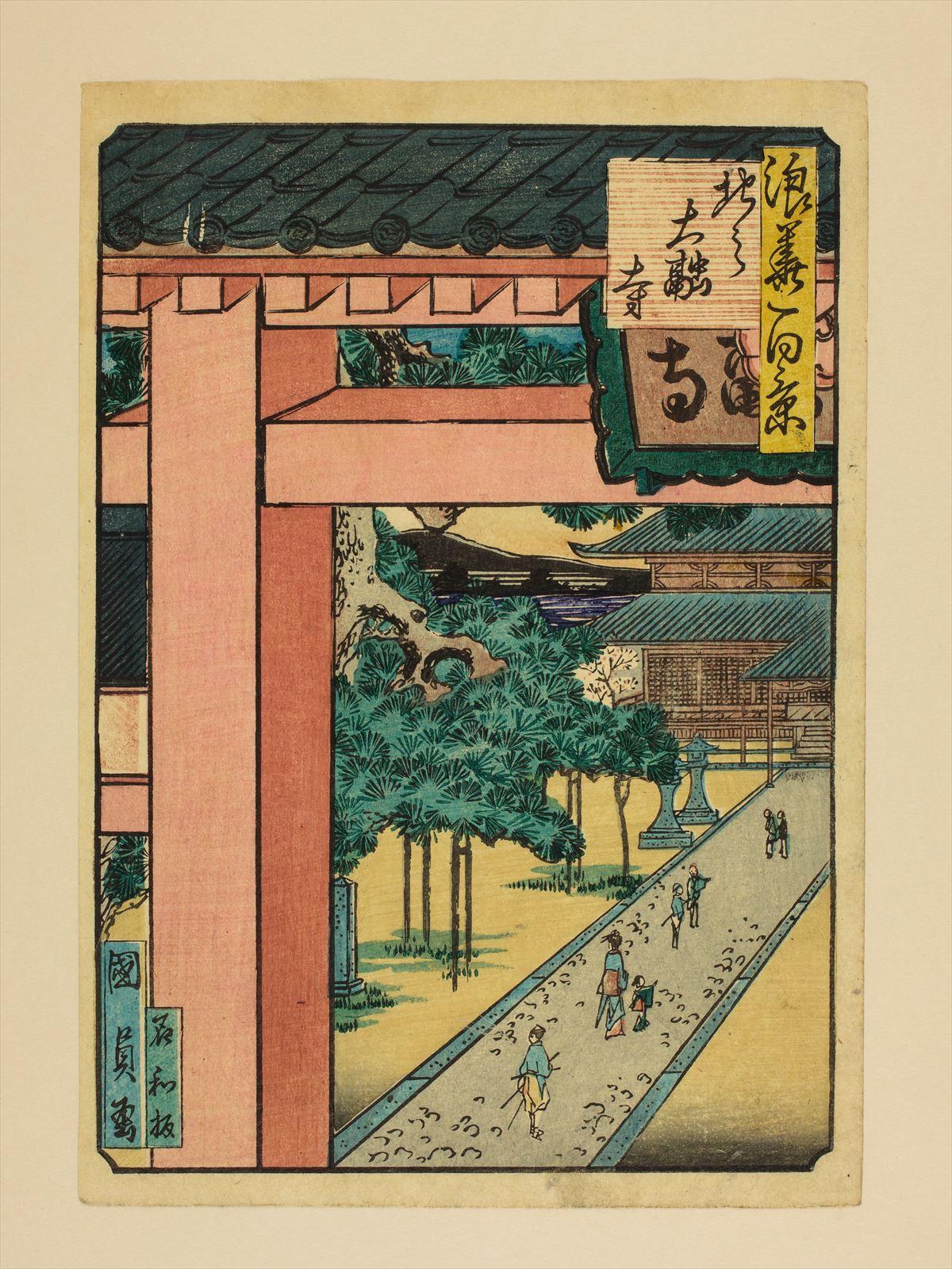 1800年代。歌川國員/画。浪花百景 102枚のうちの1枚。大阪市立中央図書館蔵。